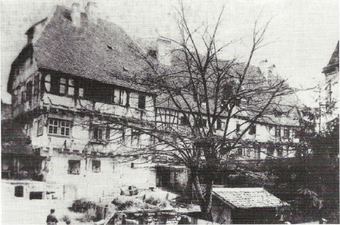 Kloster Maulbronn, Pfründhaus, 1892 abgebrannt.